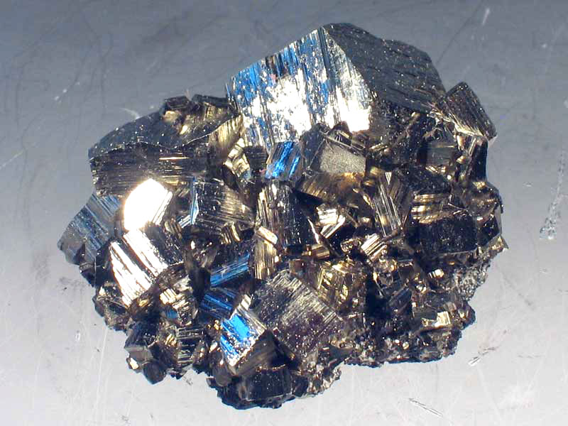 piryt, pochodzenie Rumunia;autor zdjęcia Stowarzyszenie Spirifer